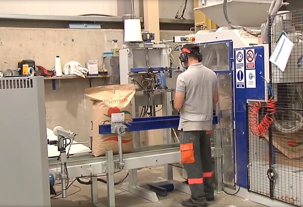 El presidente de la Junta visita Copiso.